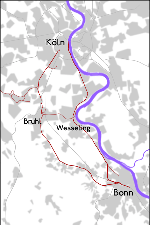 Streckennetz der Köln-Bonner Eisenbahn ca. 1975